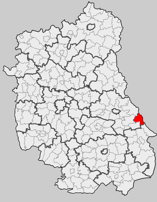 Map of gmina Dubienka, Chełm county, Lublin voivodship Mapa gminy Dubienka, powiat chełmski, województwo lubelskie